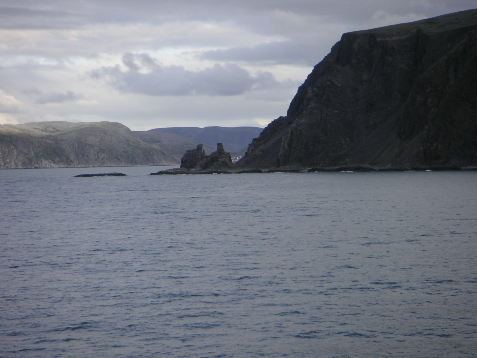 The Rock "Finnkirka" in Norge